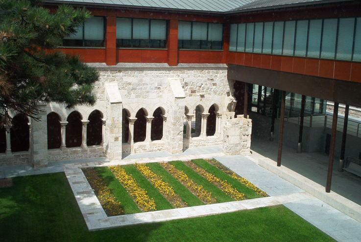 Imagen del claustro del Real Monasterio de San Agustín de Burgos, sede del Consorcio Camino del Cid